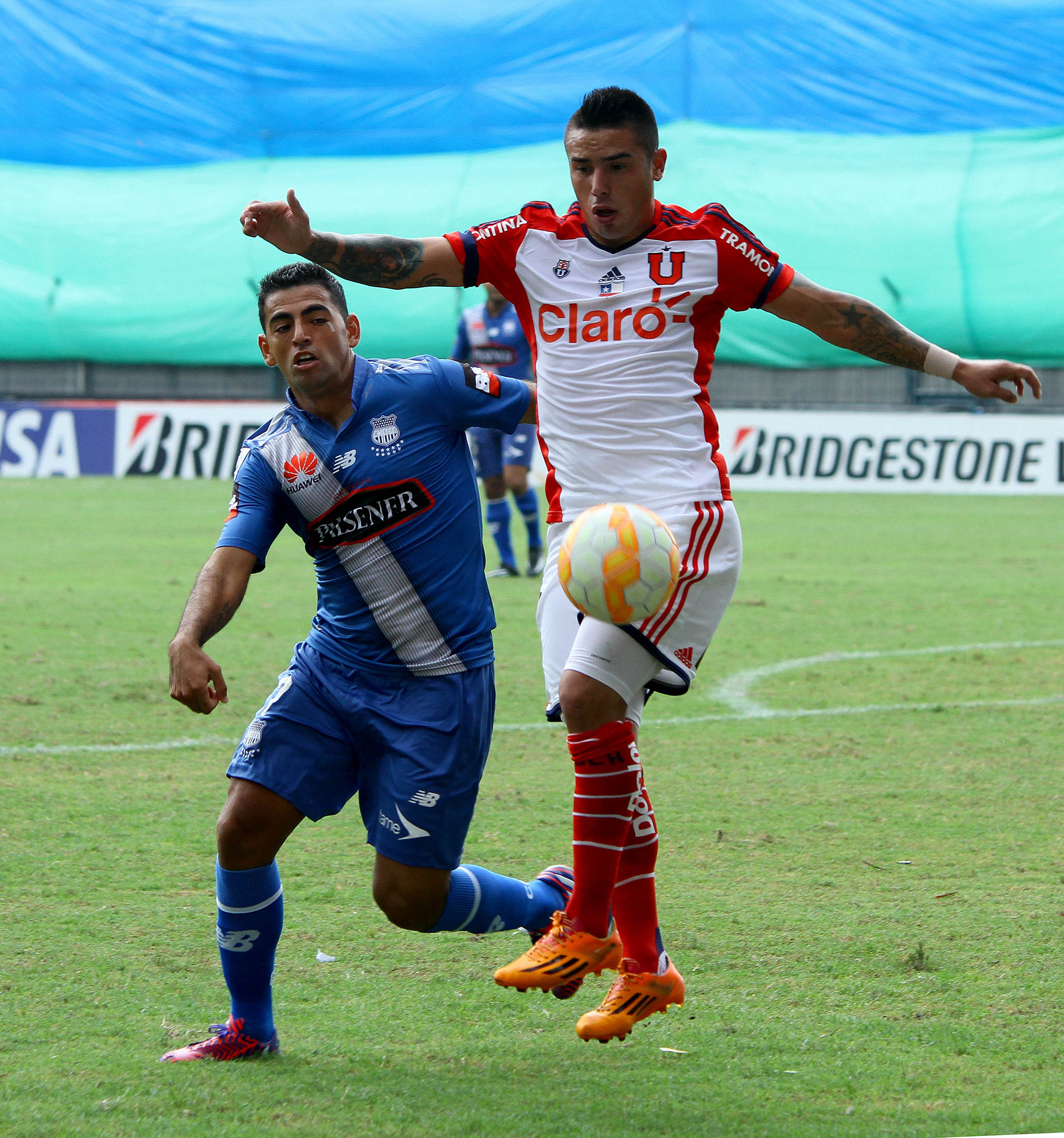 Guayaquil, 22 de abr (Andes).-Joao Ortiz de la Universidad de Chile (17) disputa el balon con Miguel Escalada de Emelec durante el partido jugado en el estadio Capwell Foto:César Muñoz/Andes